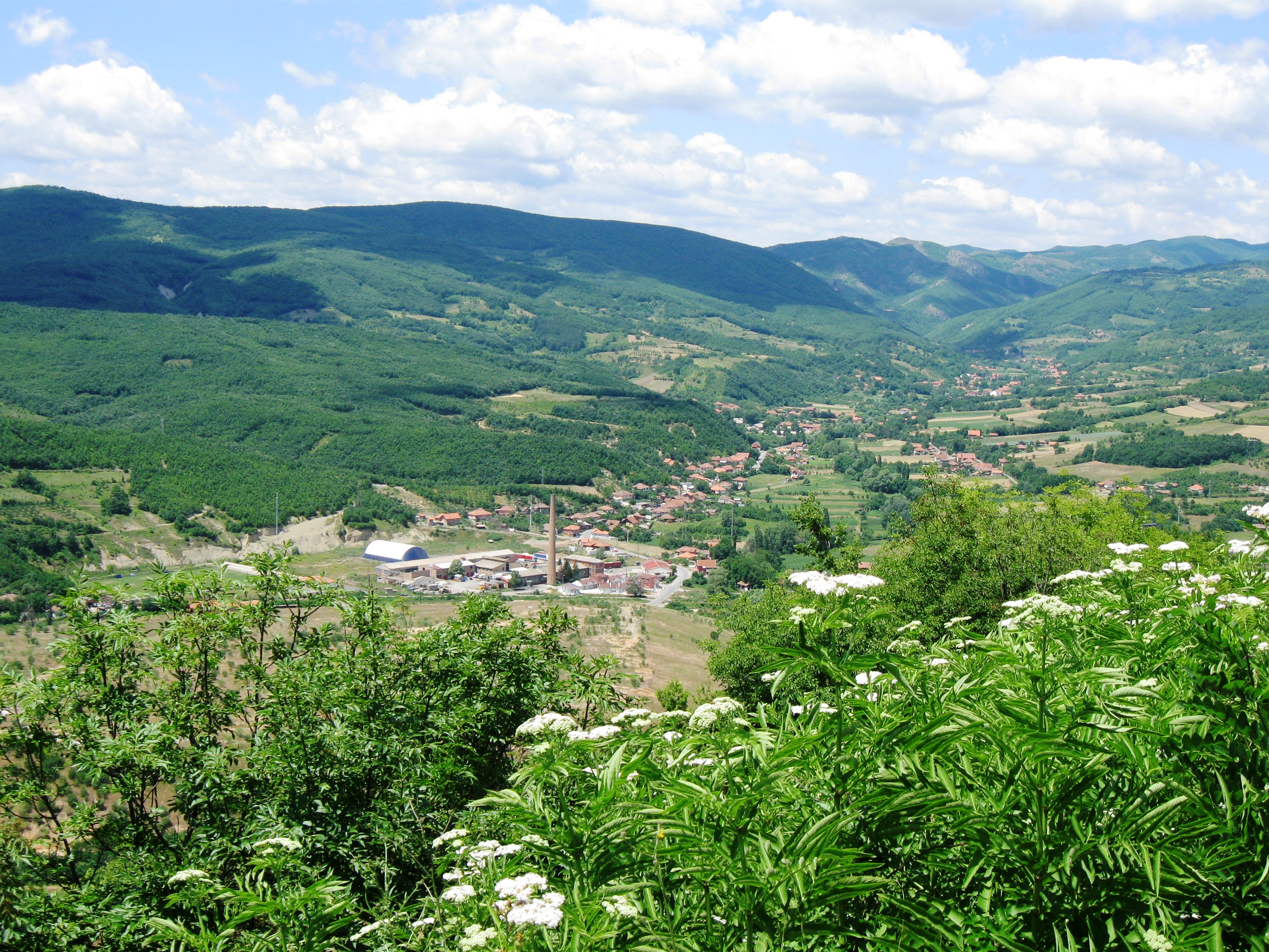 Snimak Radosava Stojanovica